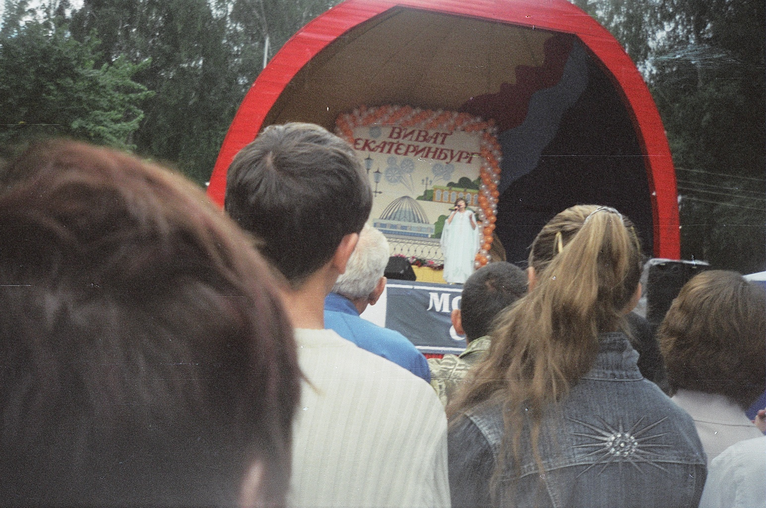 Концерт Э. Пьехи в екатеринбургском ЦПКиО им. В.В. Маяковского в день города, 20.08.2005.